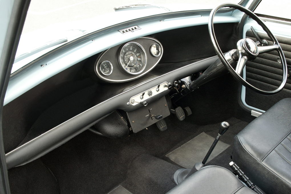 Mini Interior